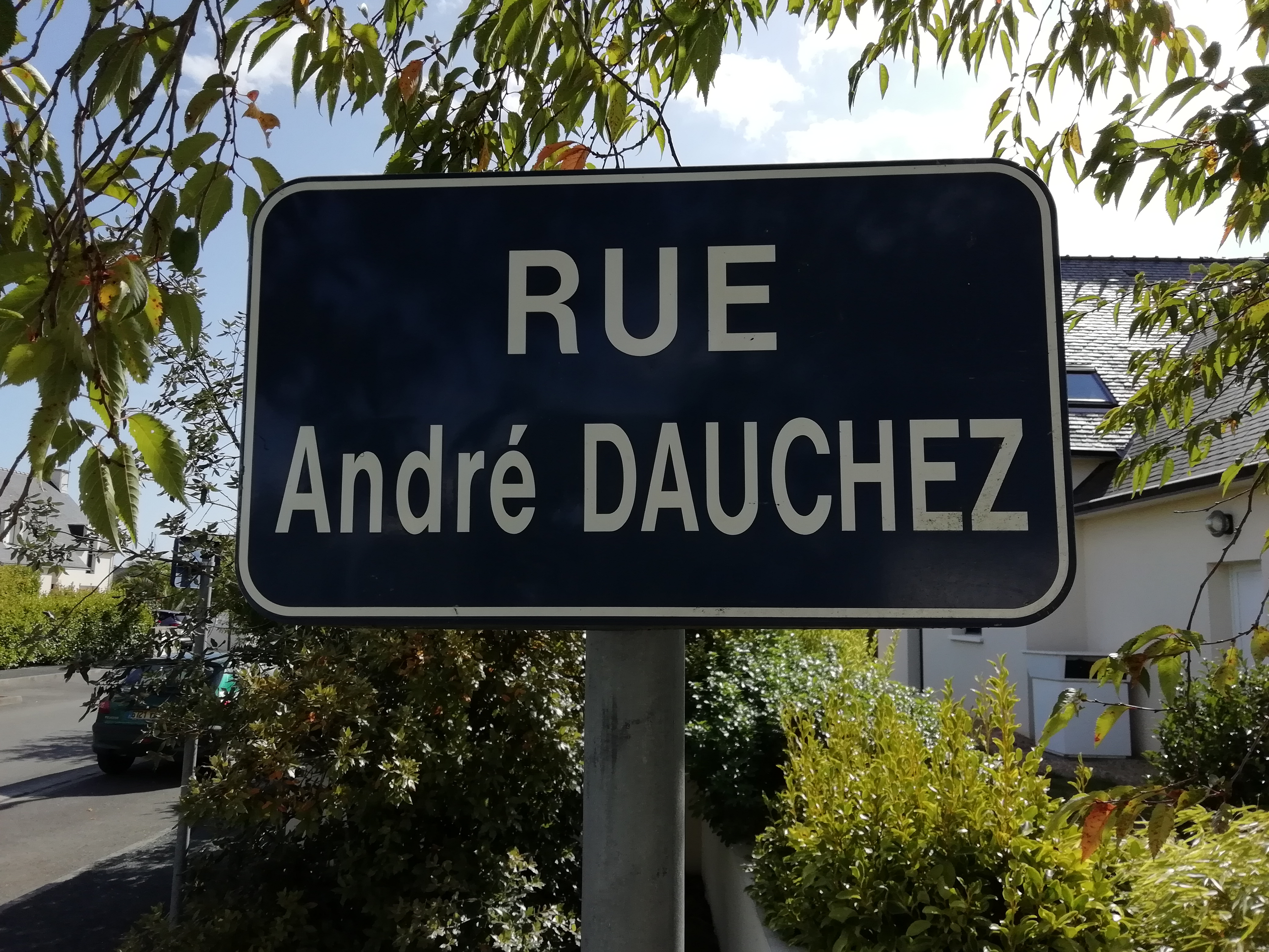 Loctudy